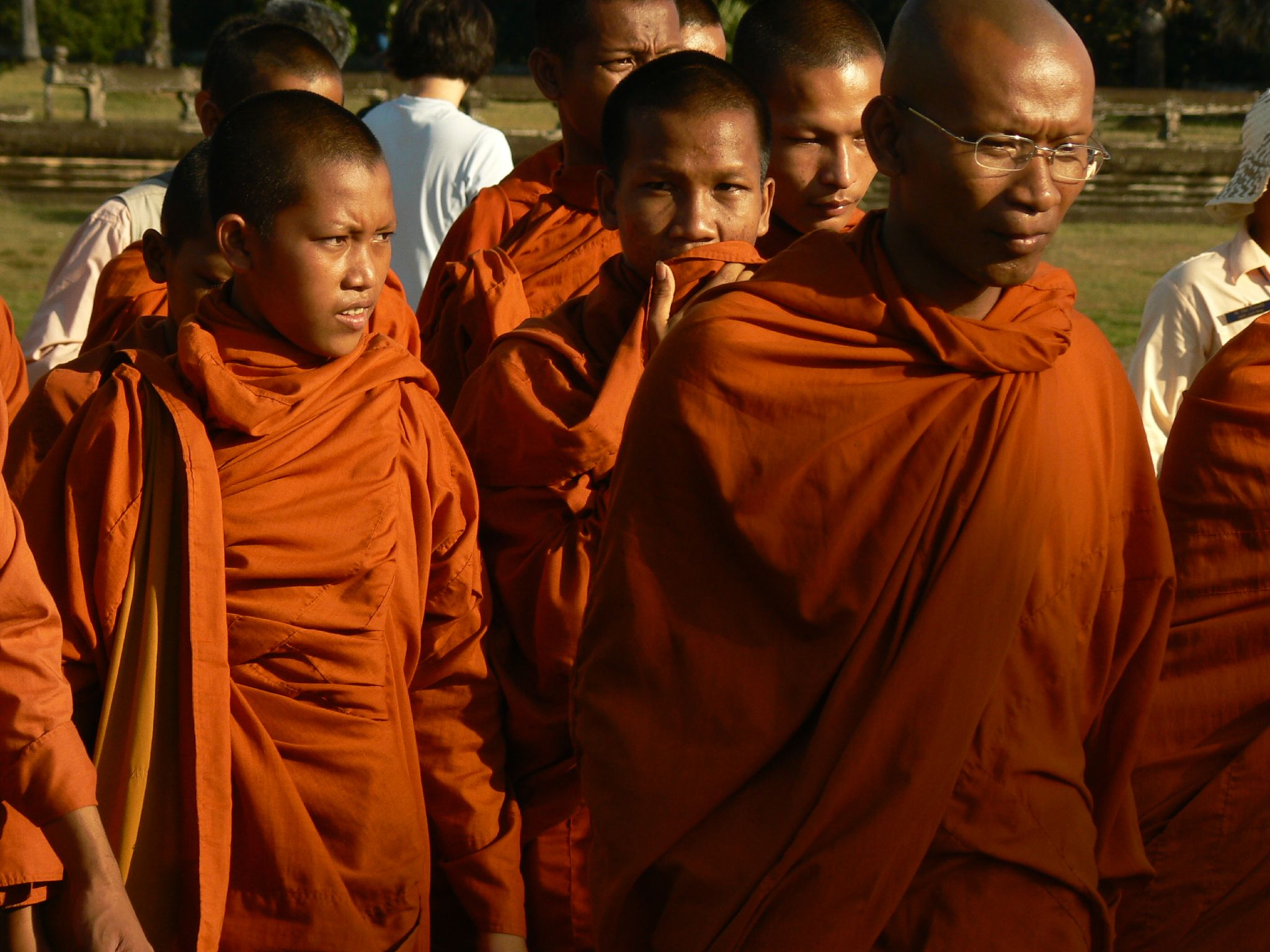 Monks at Angkor Wat, Cambodia